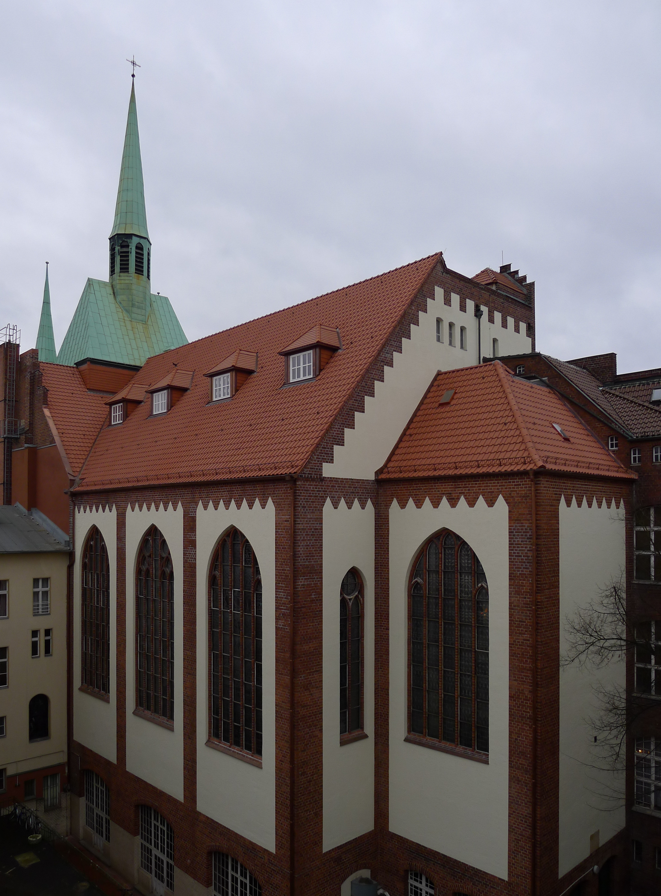 Kirchenschiff der St. Elisabeth-Kirche